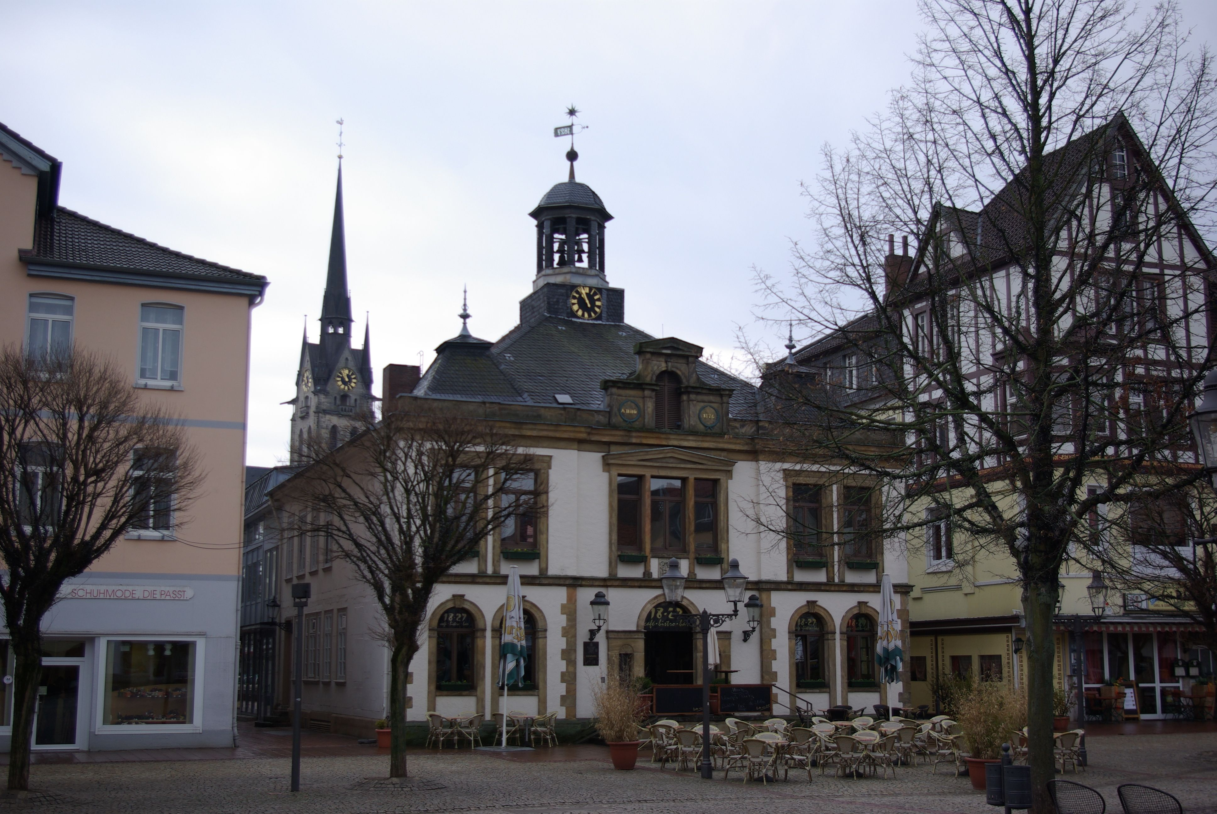 Peine in Niedersachsen. Das Alte Rathaus steht am Markt in Peine. Es wurde 1827 errichtet.